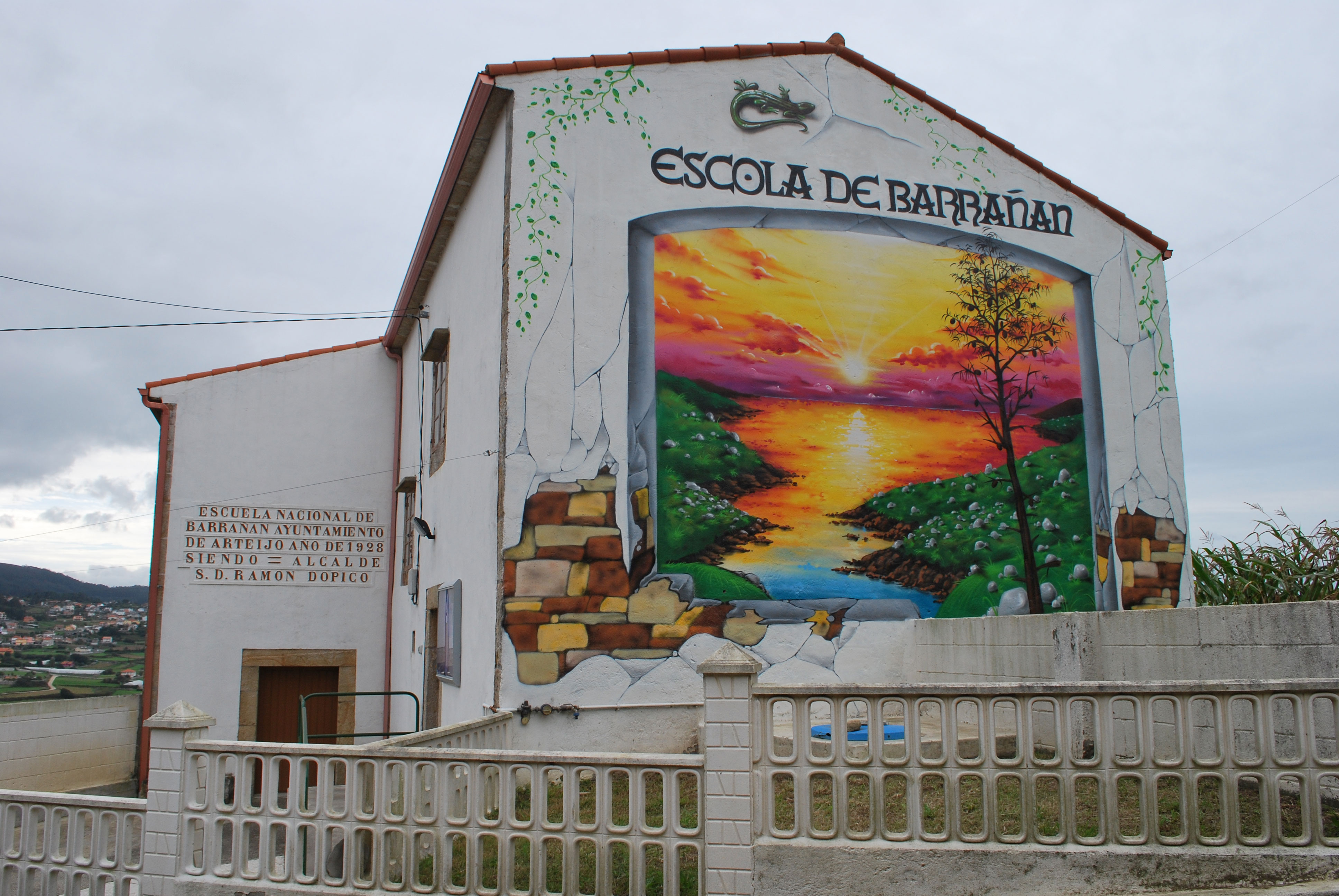 Escola de Barrañán Arteixo A Coruña Galiza